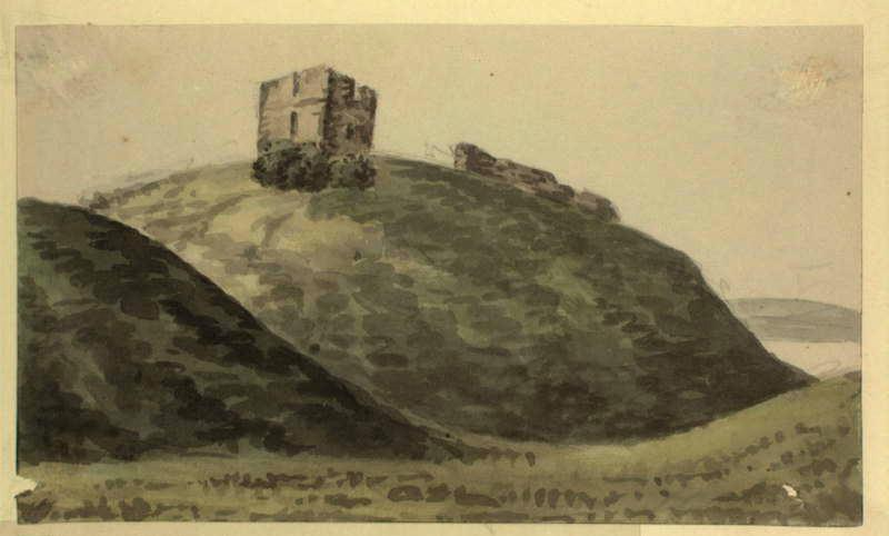 Ole Jørgen Rawert - Kalø Slotsruin 1800